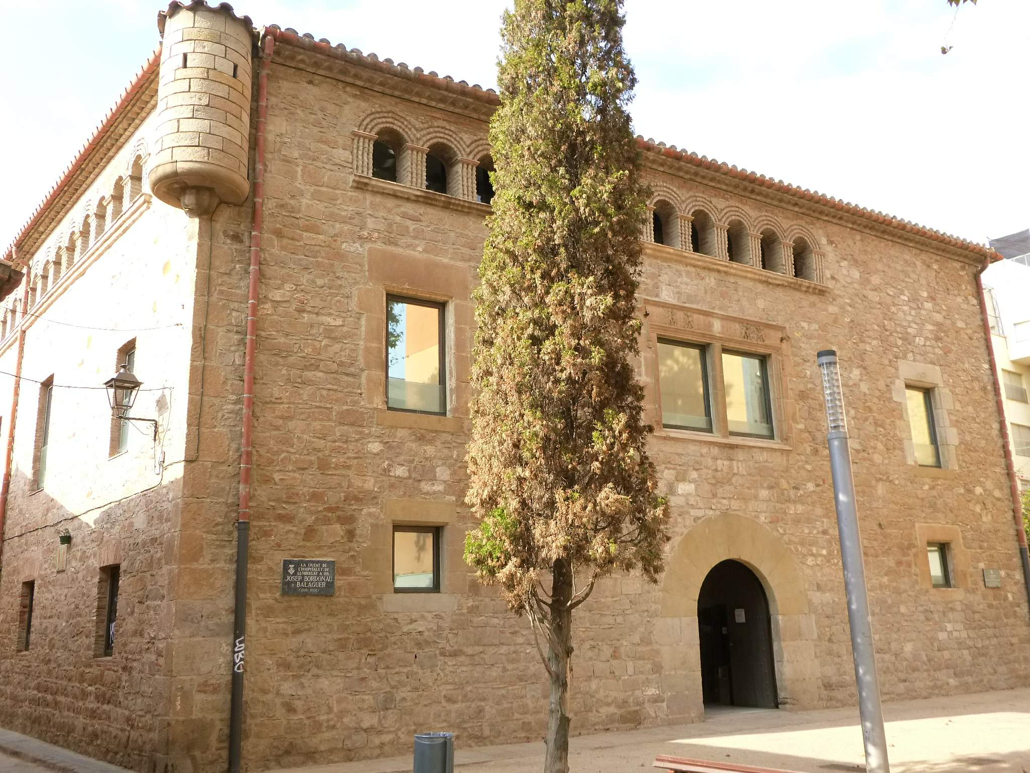 L'Harmonia (L'Hospitalet de Llobregat).